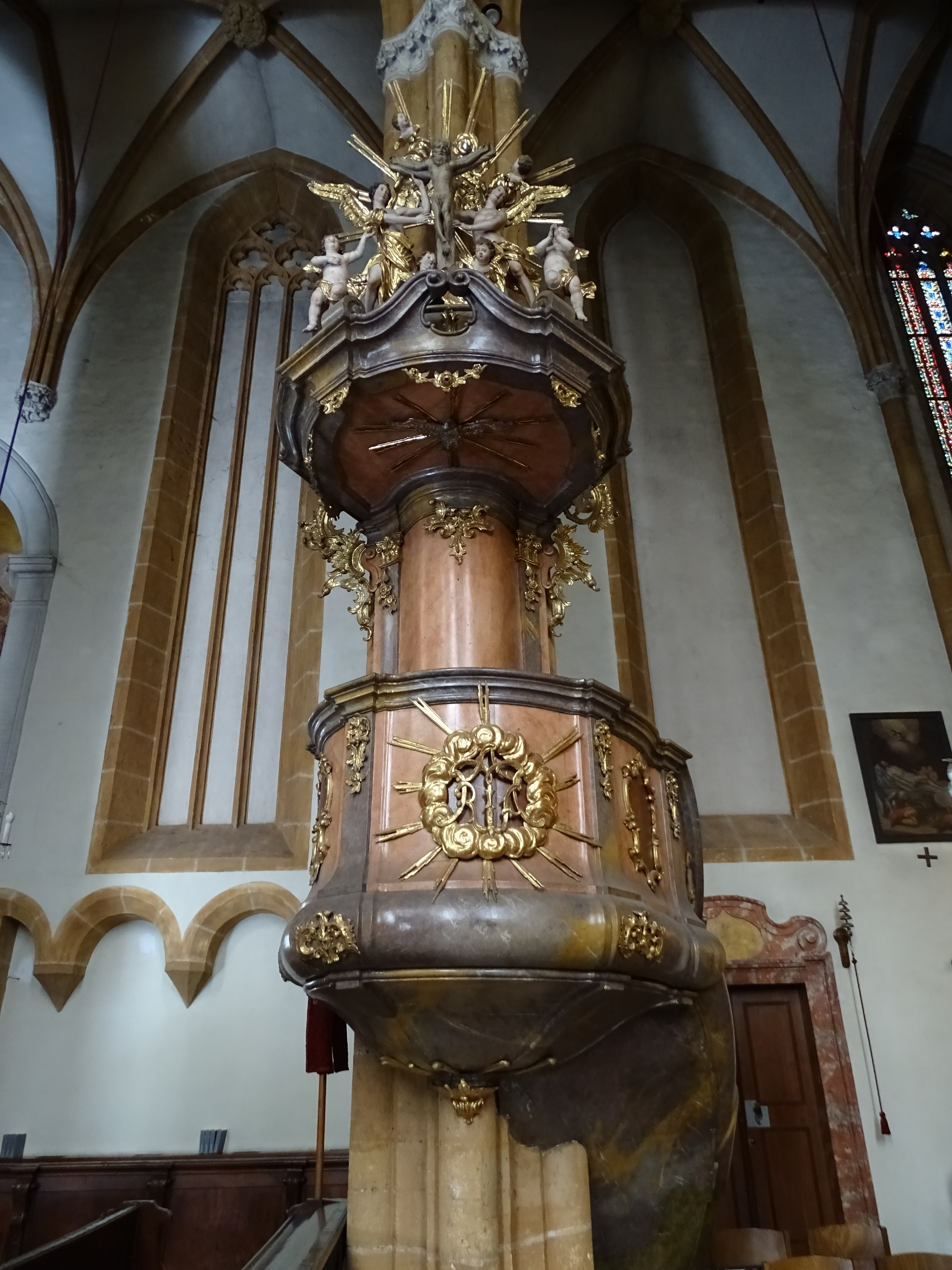 Die Jakob Peyer zugeschrieben Kanzel der Wallfahrtskirche Maria Straßengel